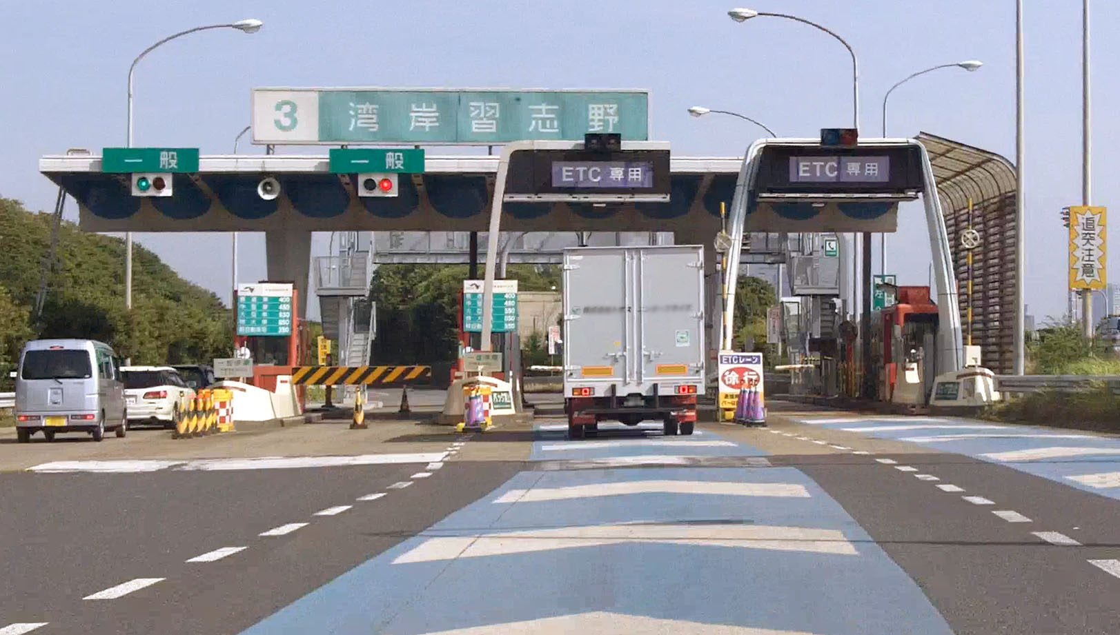 湾岸習志野インターチェンジ出口料金所